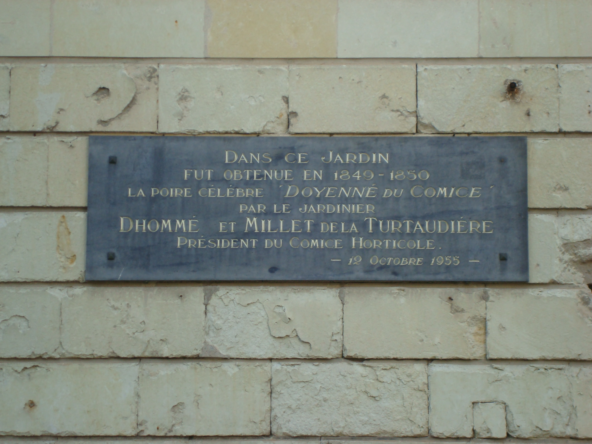 Plaque commémorative de la création de la Doyenné du Comice (variété de poire) à Angers au XIXe siècle par Pierre-Aimé Millet de la Turtaudière.